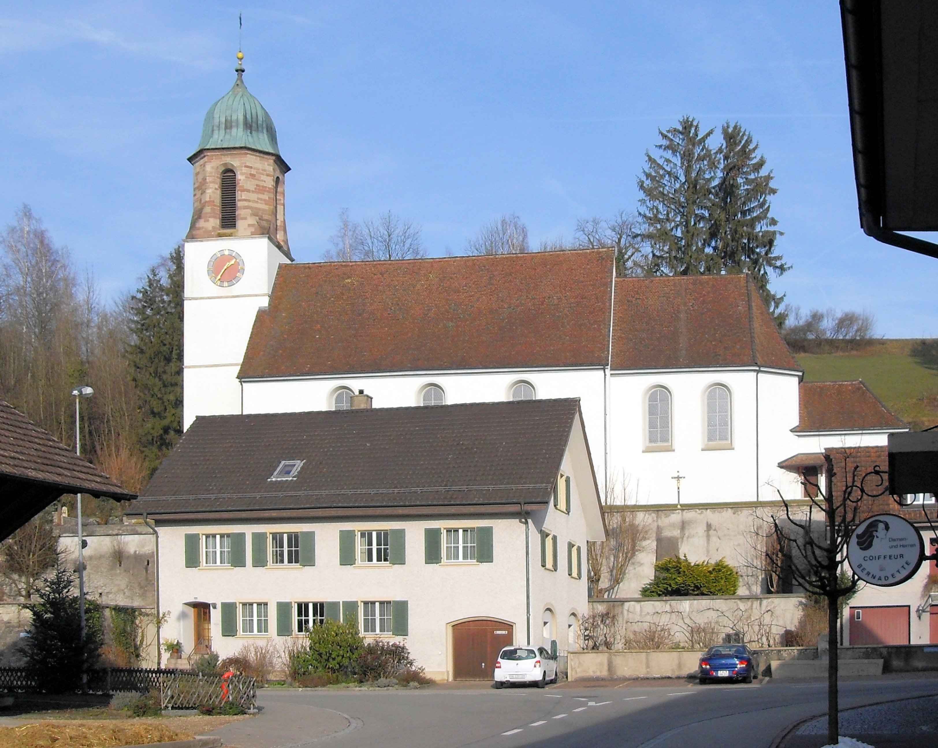 Südseite der Pfarrkirche St. Michael in Kaisten, Kanton Aargau, Schweiz